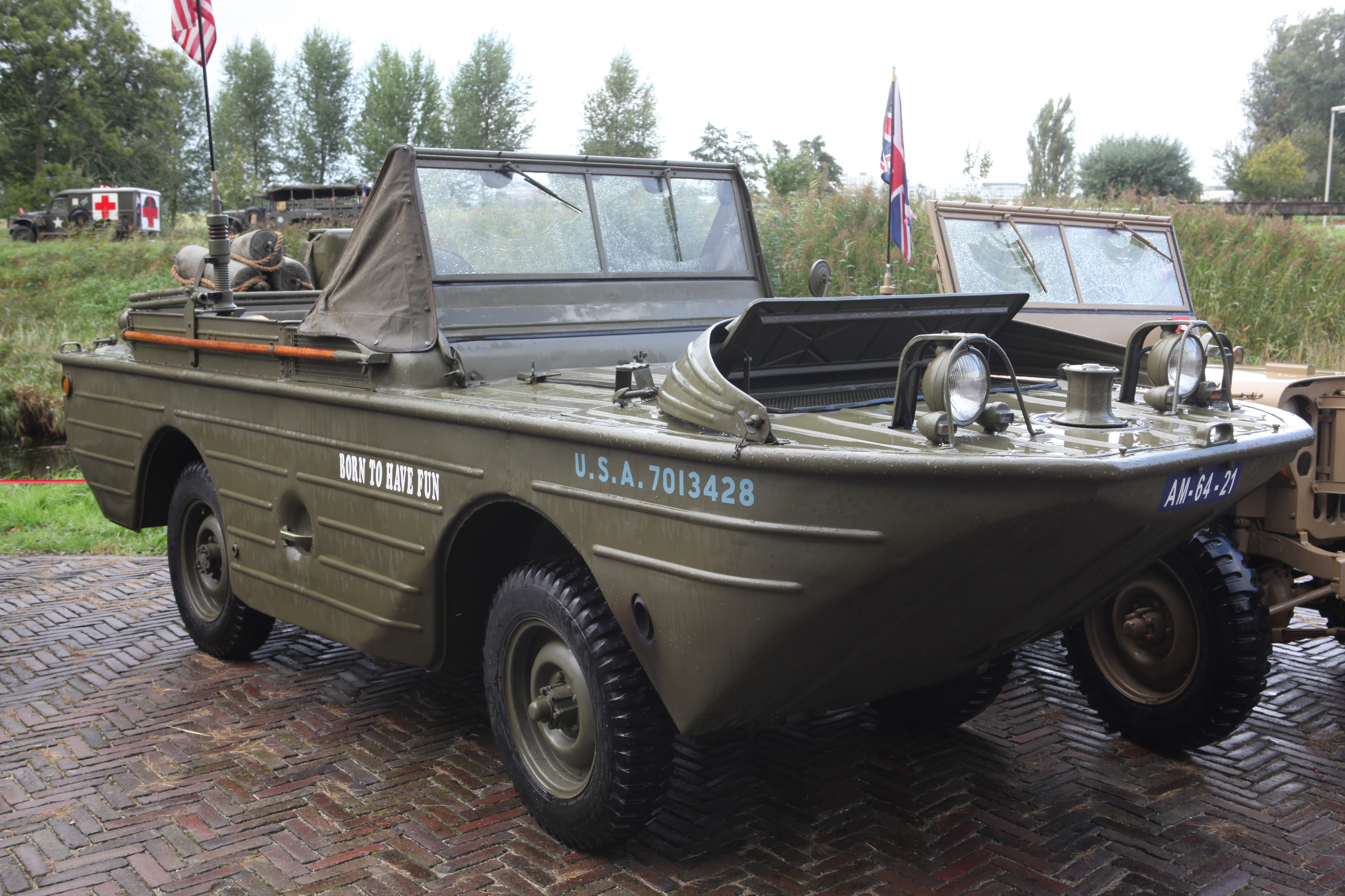 Ford GPA